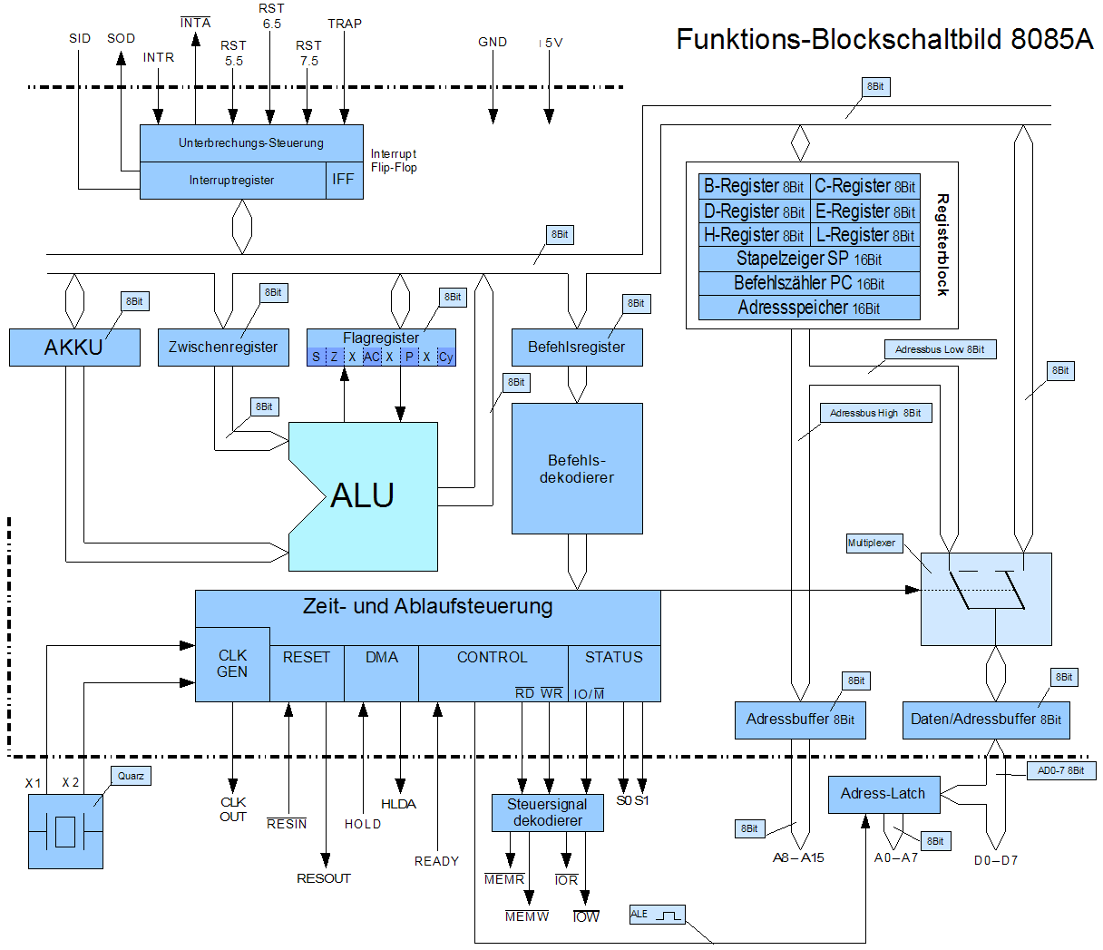 Funktionsblock-Schaltbild des Intel 8085, mit den Funktionseinheiten Anschlüssen und Bussystem